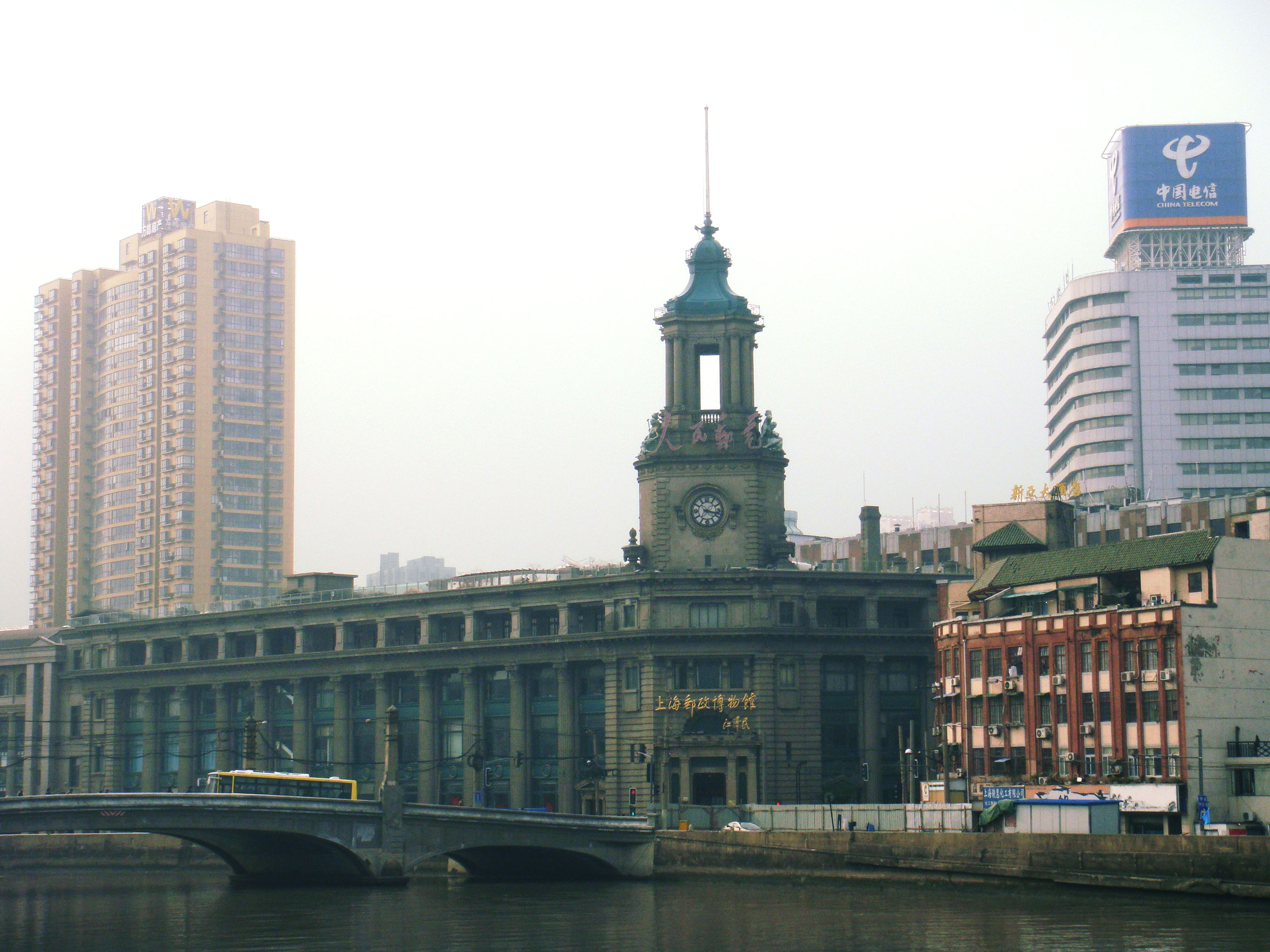 从乍浦路桥看邮政局大楼